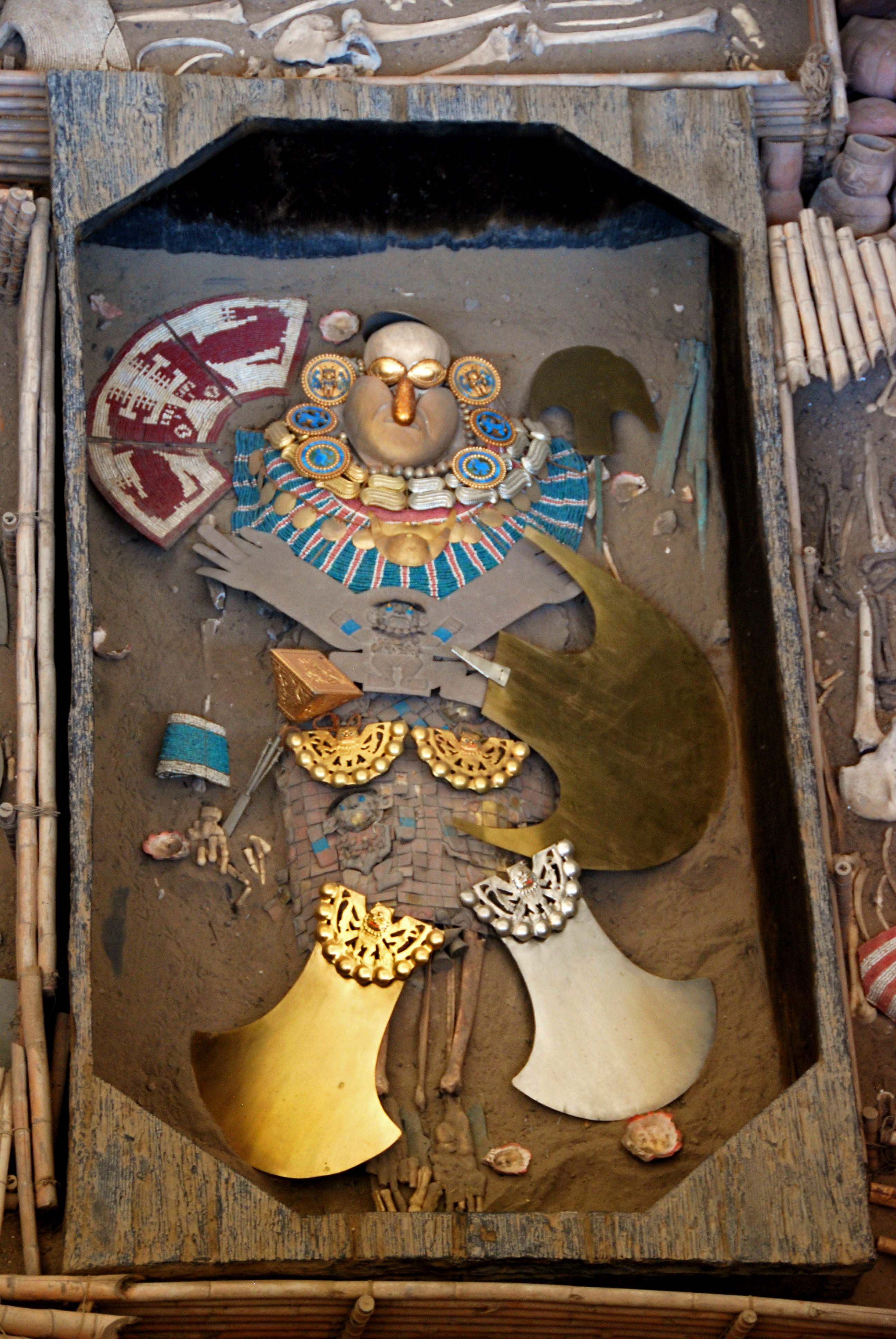 Reconstrucción de la Tumba del Señor de Sipan